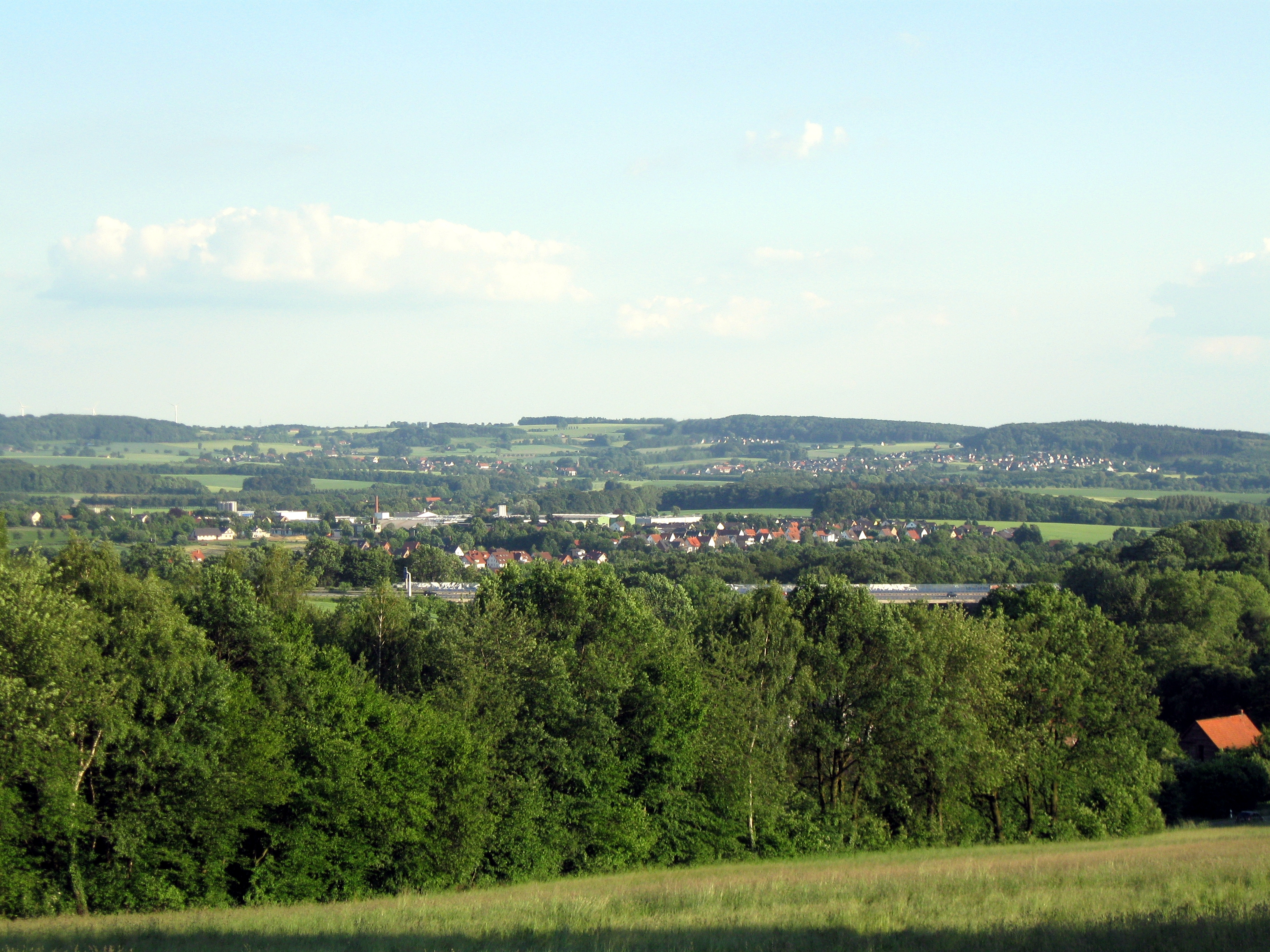 Blick über Exter von Norden (von Nähe Steinegge)- im Hintergrund das lippische Wüsten vor dem Vieren- und Asenberg.